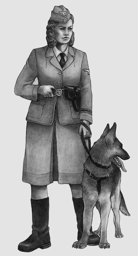 SS-Aufseherin: Female Camp Guards